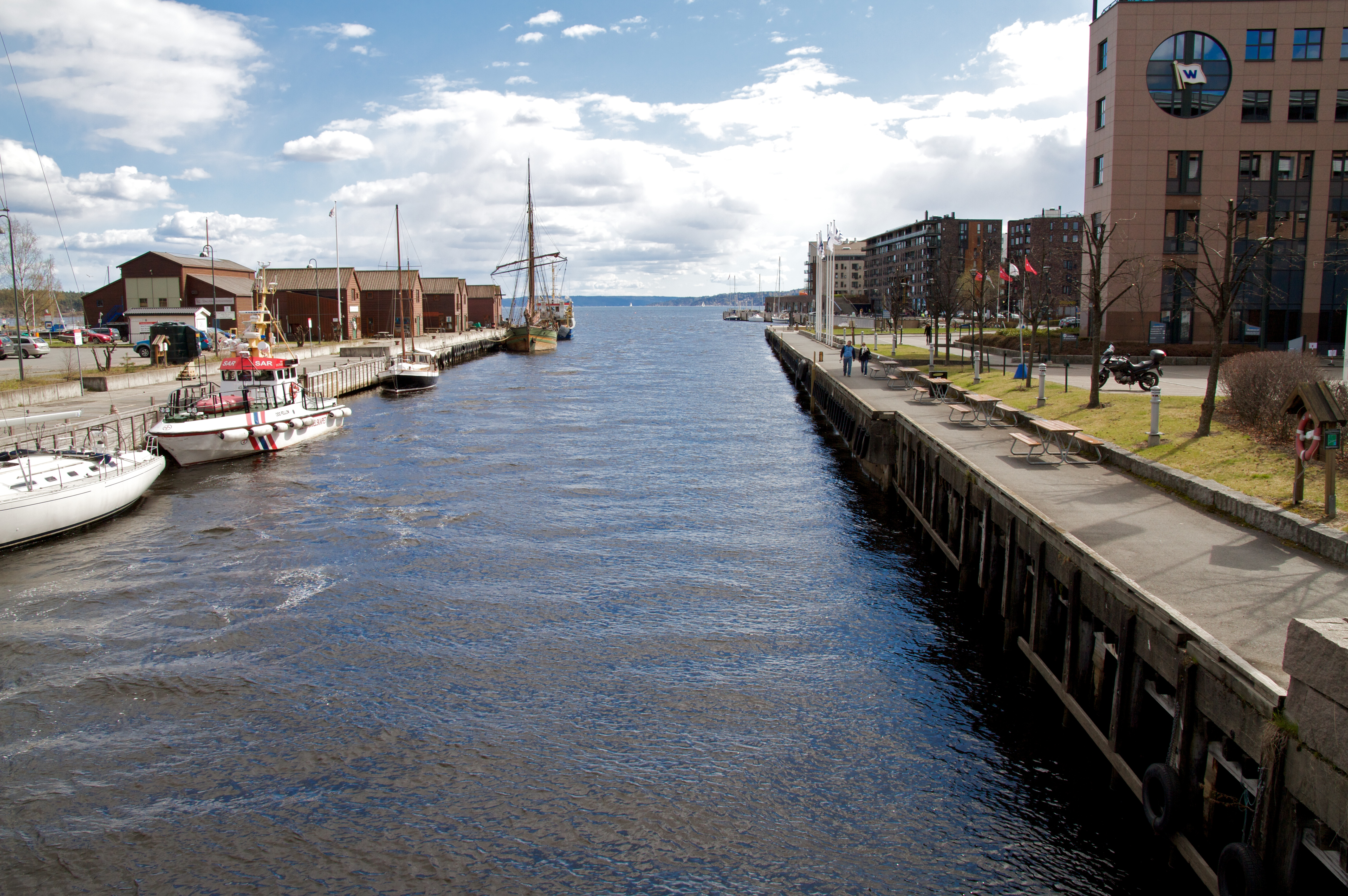 Lysakerelven.